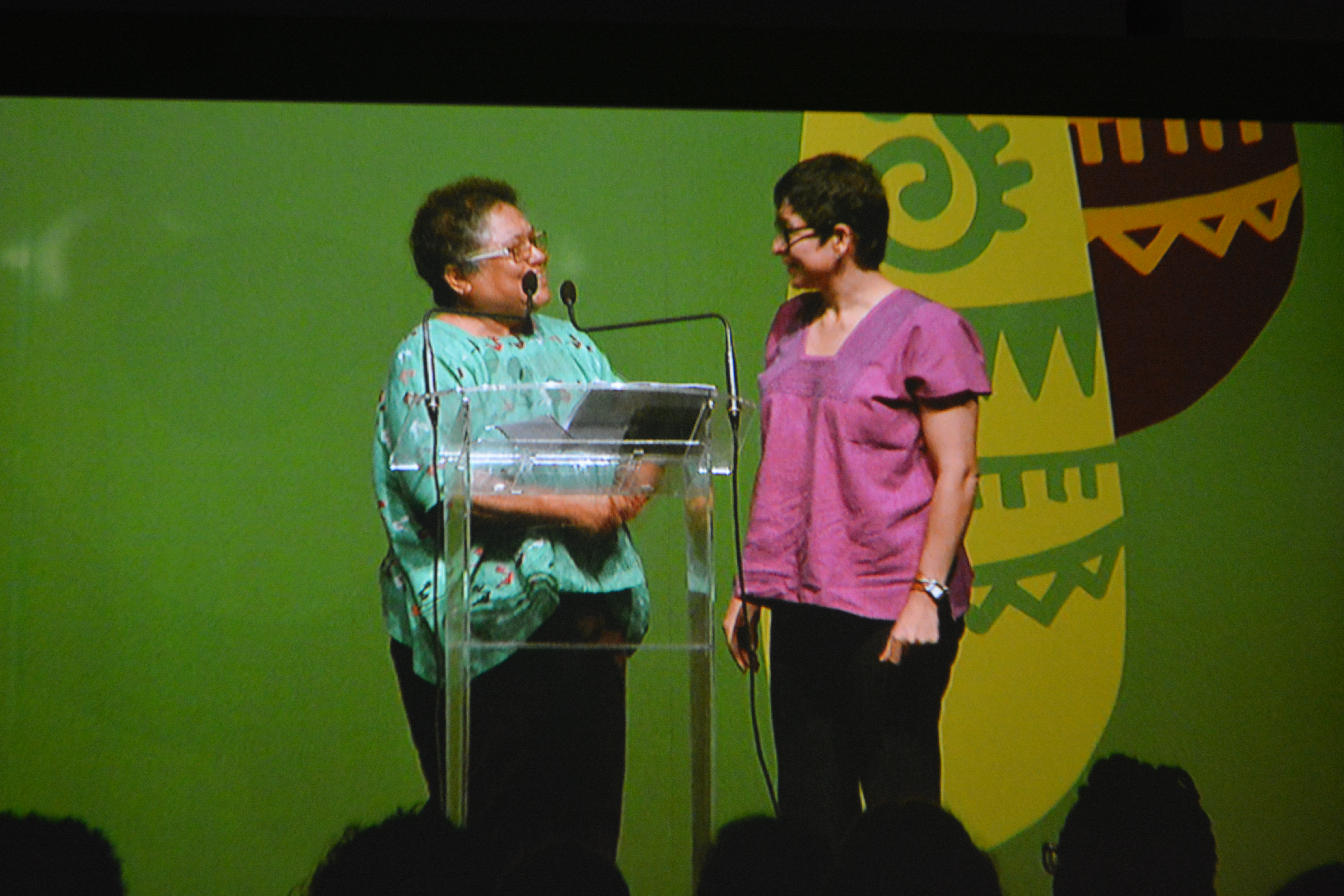 Feminista en AWID 2016